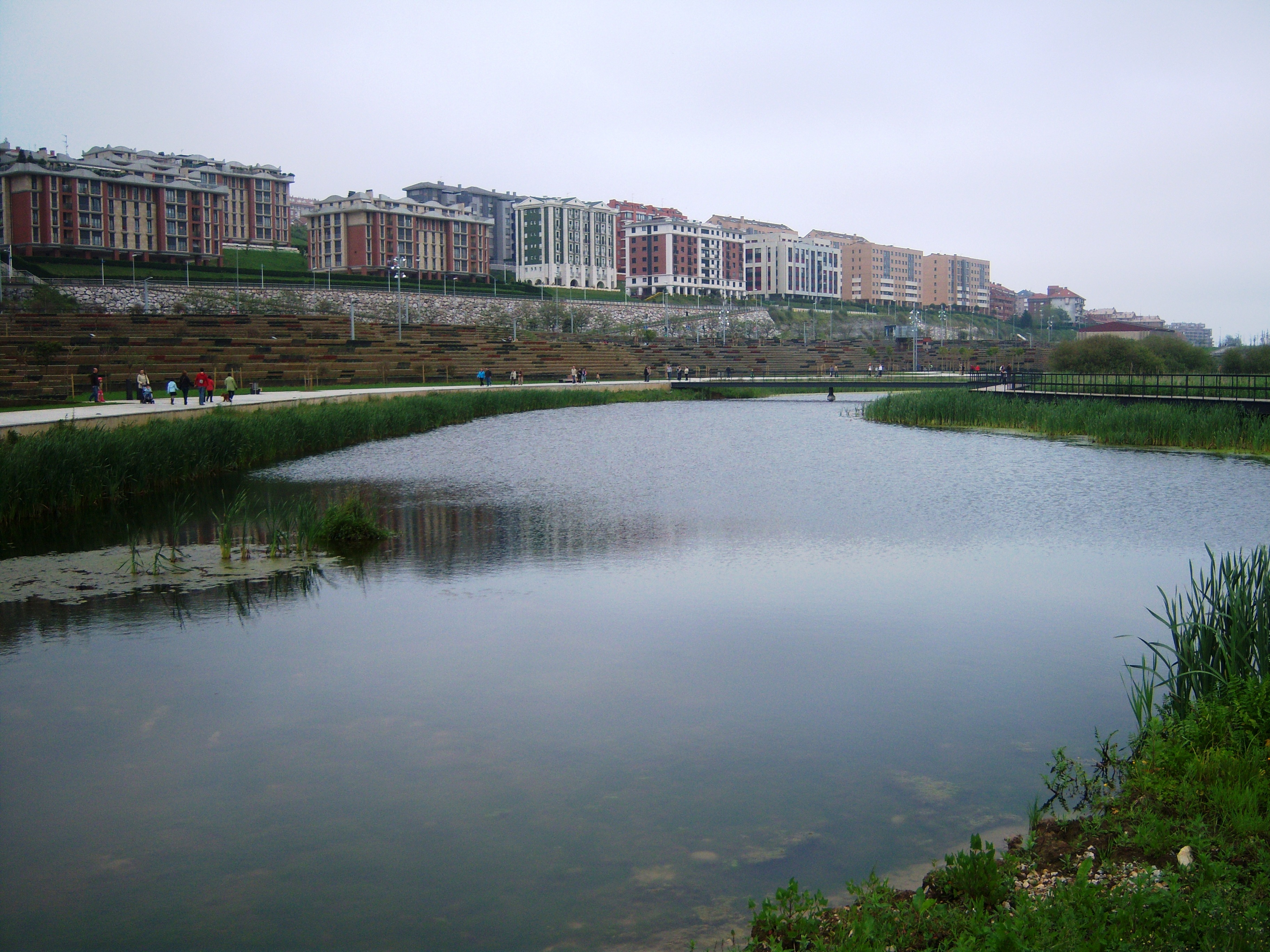 Arroyo del Parque Atlántico de las Llamas en Santander (Cantabria, España).